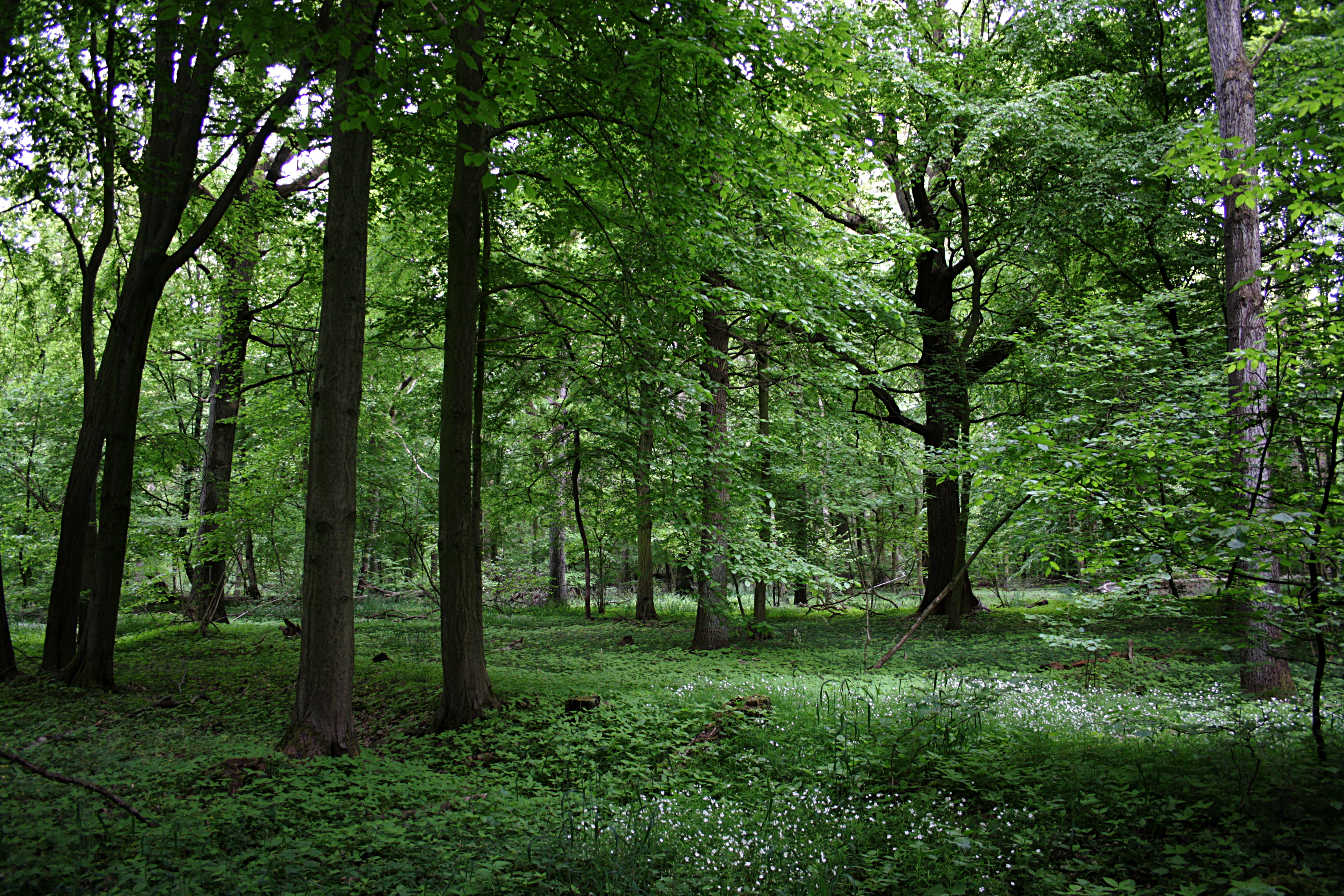 Timmerlaher Busch in Braunschweig, Niedersachsen, Wald im Landschaftsschutzgebiet "Timmerlaher Busch, Gleidinger Holz und angrenzende Landschaftsteile" (LSG BS 00013)